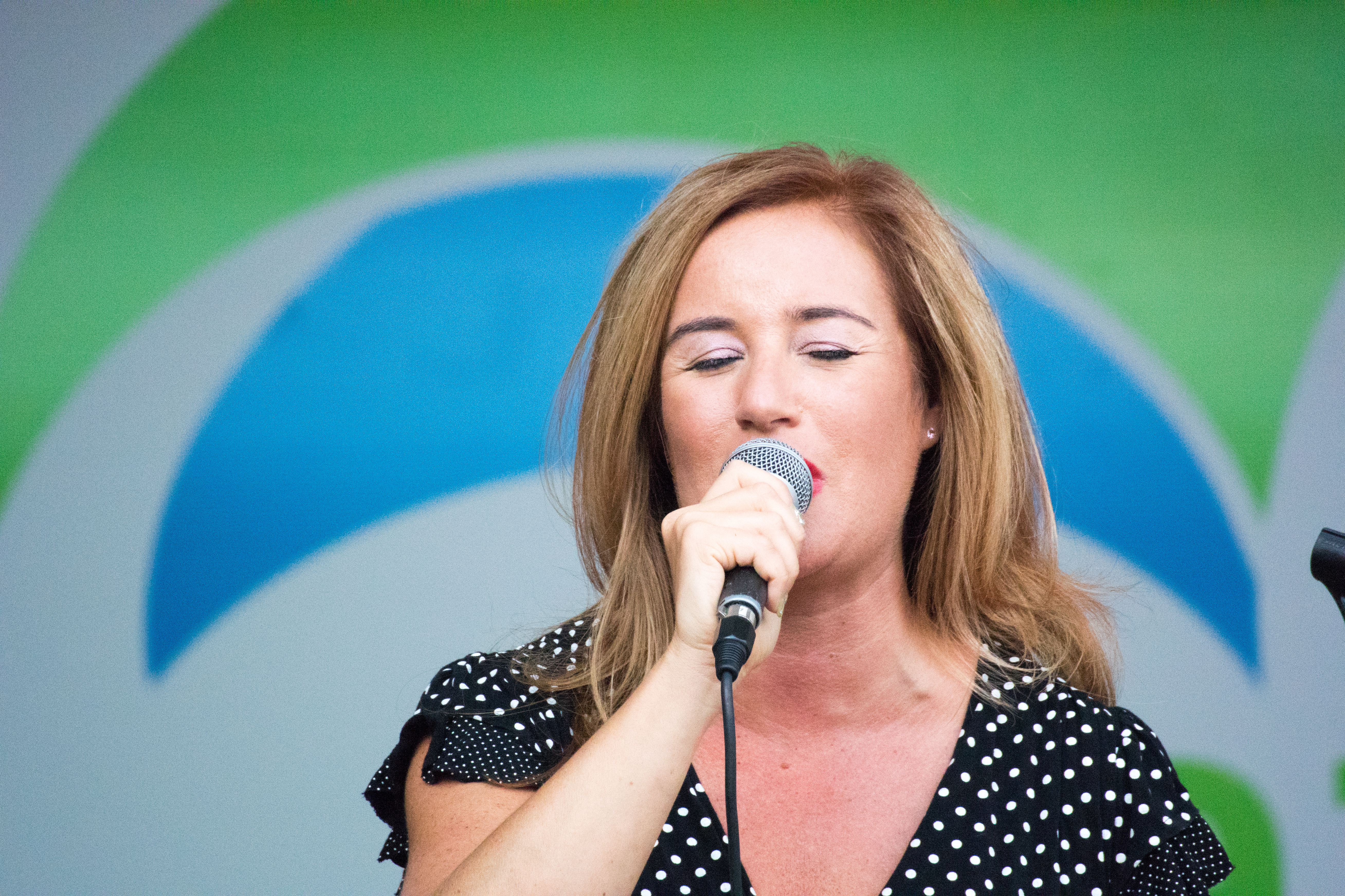 Milana Misic suomalainen laulaja